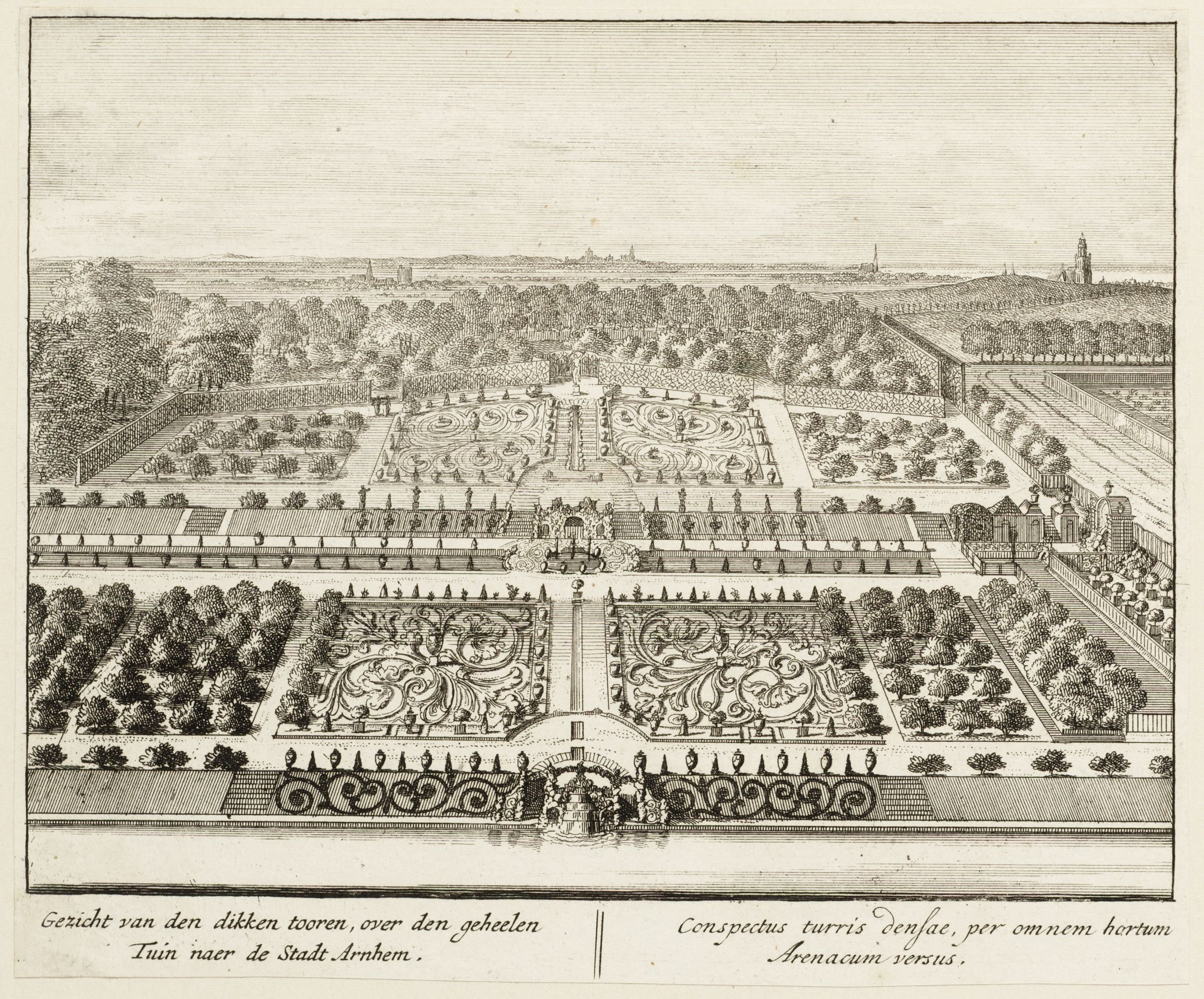 gravure van het uitzicht van de dikke toren van Kasteel Rozendaal over de hele tuin